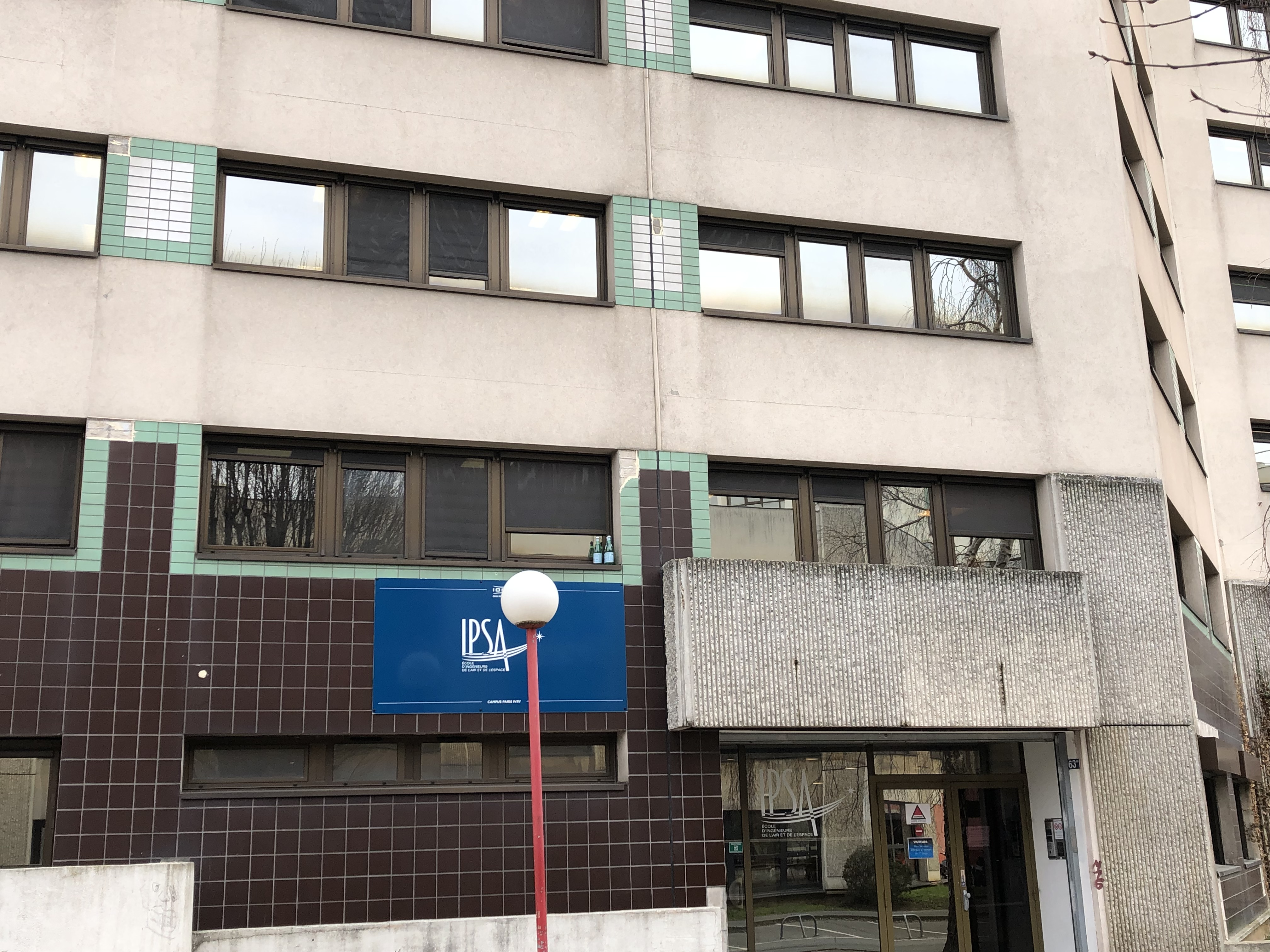 Entrée principale du campus Paris Ivry-sur-Seine de l'Ecole d'ingénieurs IPSA Paris, boulevard de brandebourg